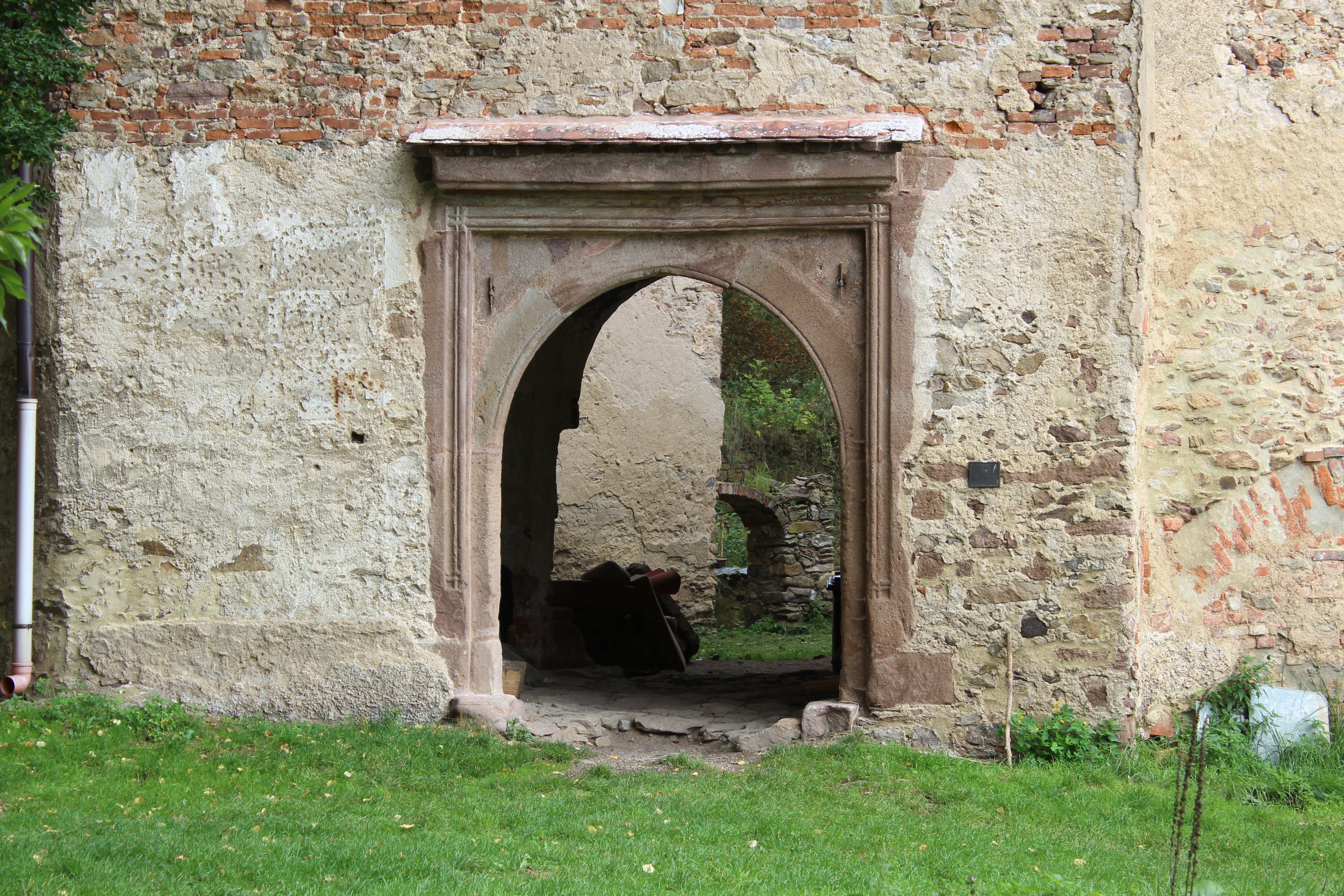 Pozdně gotický portál popovické tvrze.Vodní tvrz Popovice (okres Benešov) Tvrz Popovice je vynikající ukázkou vývoje panského sídla od tvrze k renesančnímu a baroknímu zámečku. Pohled z prostoru před tvrzí na nově restaurovaný pozdně gotický portál vstupní brány v západním křídle tvrze. Pohled do nádvoří tvrze. V pozadí záběru je v nádvoří viditelná západní stěna gotické věže.